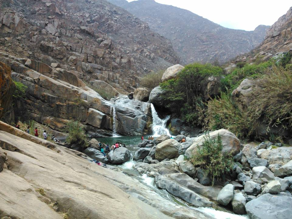 las cataratas de condornada ubicada en la parte alta del caserio de caray de la provincia de virú imagen creada por Daniel Zumarán